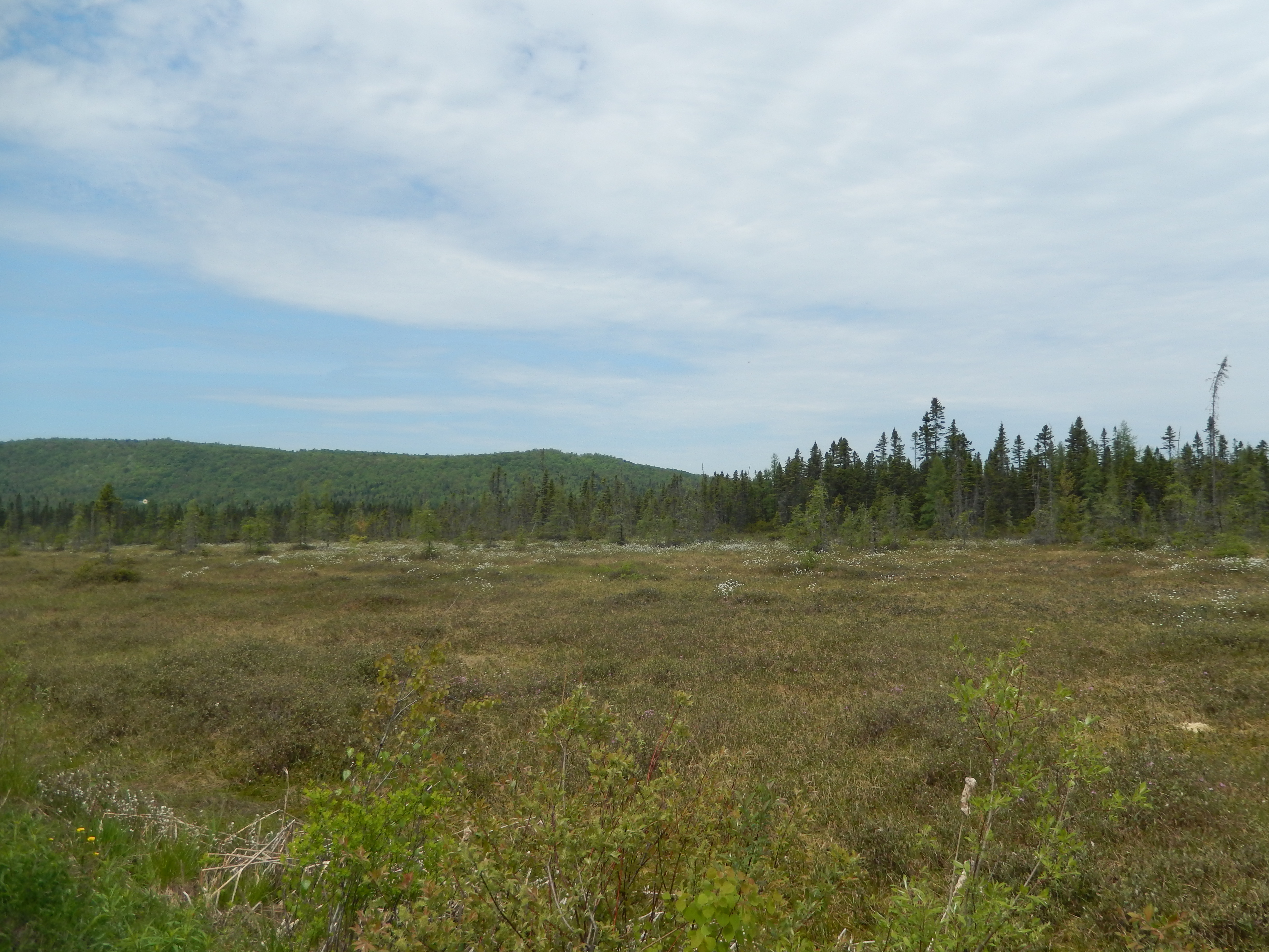 Réserve écologique de la Tourbière-de-Shannon